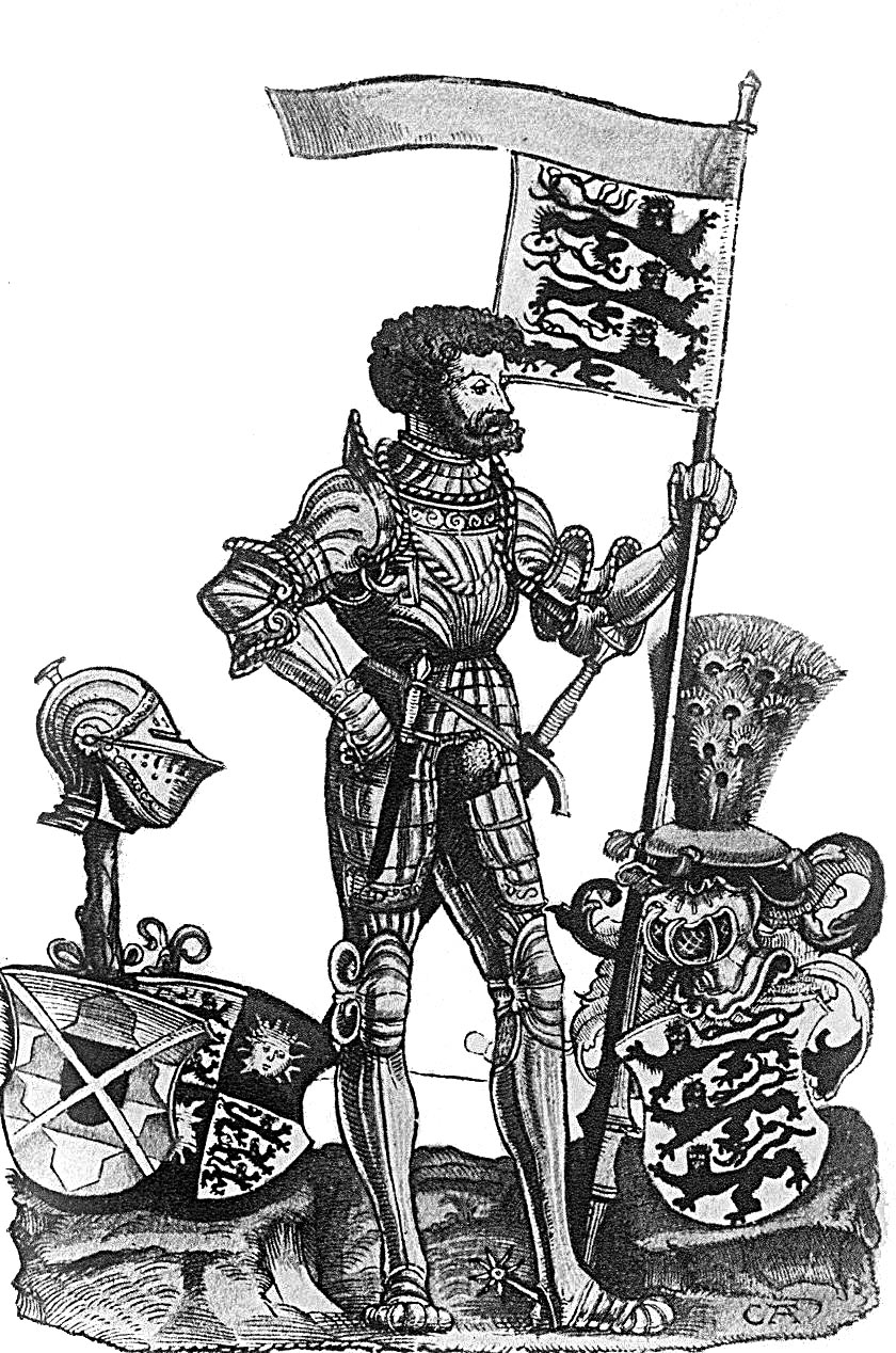 Jörg Truchseß von Waldburg (Der „Bauernjörg“; 1488-1531), „nach einem Holzschnitt von Christian Amberger um 1536“